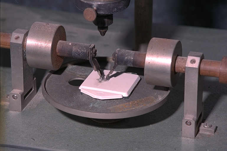 Meßanordnung zur Ermittlung des CTI-Wertes